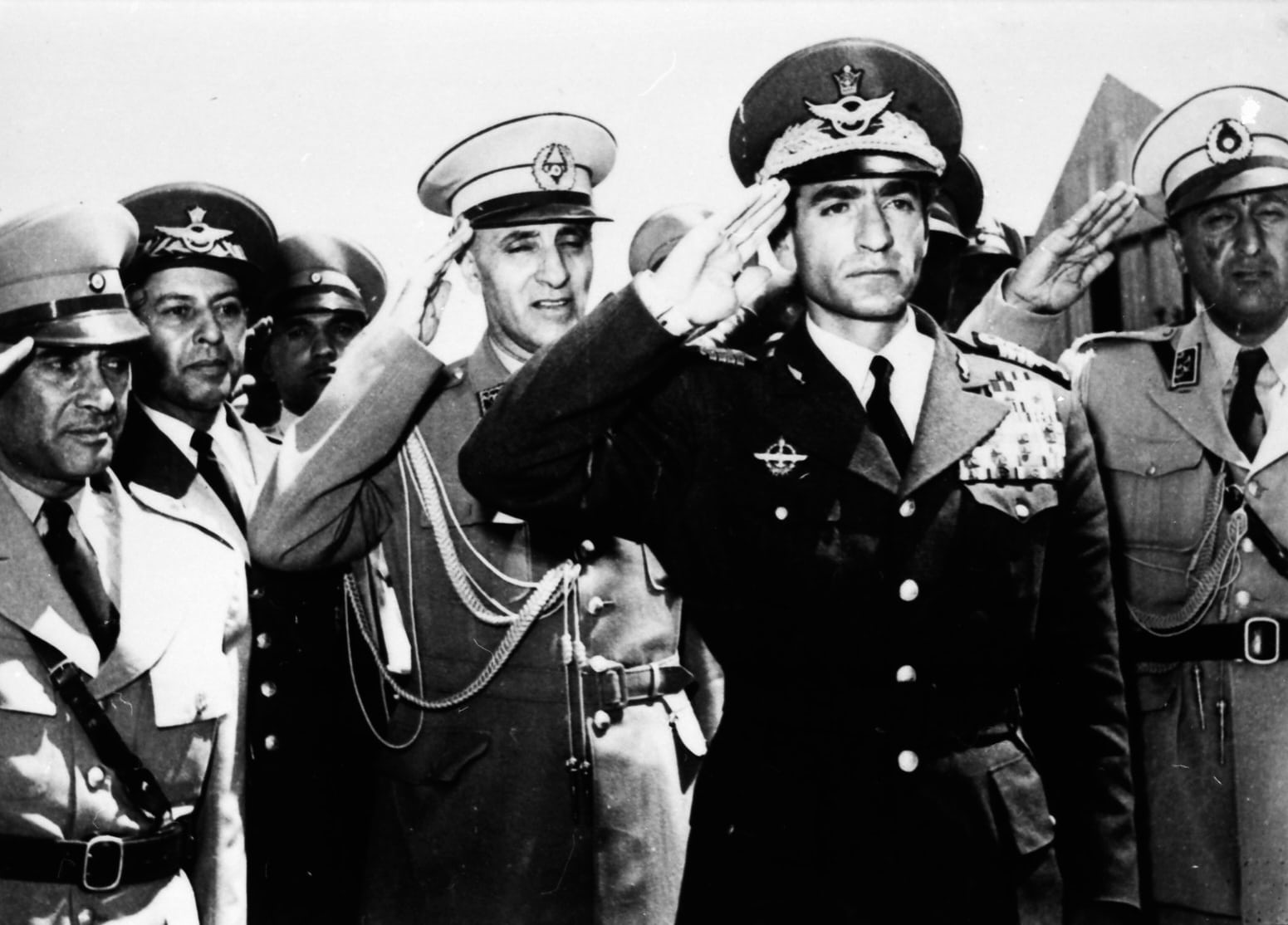 1 شهریور 1332، 10:30 صبح: پس از اعلام رسمی موفقیت کودتا، شاه با نخستین پرواز کاال‌ام از رم به بغداد رفت و از آنحا با جت شخصی خود به تهران بازگشت. فضل‌الله زاهدی در سمت راست و نعمت‌الله نصیری در سمت چپ شاه در فرودگاه مهرآباد.